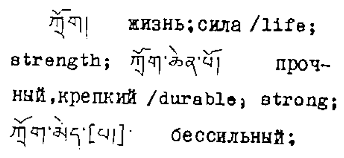 трок